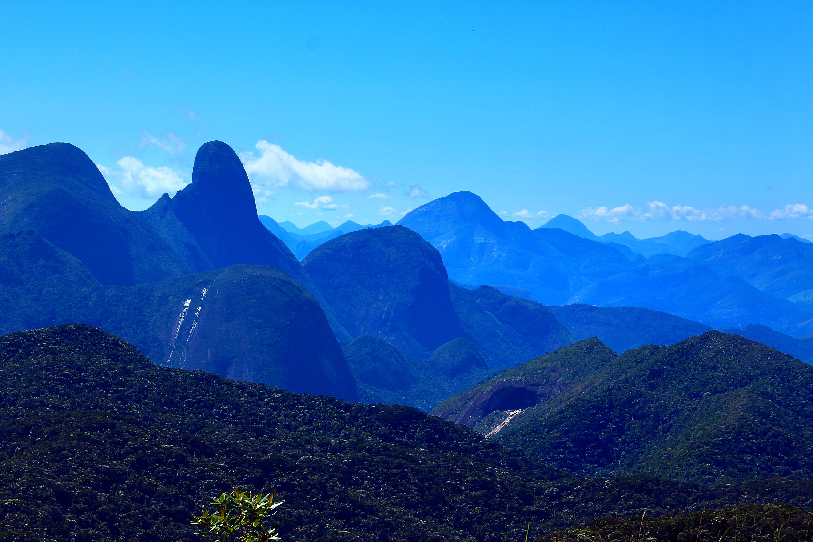 Cadeia de montanhas da Serra dos Órgãos vista do Cindacta, com destaque para Maria Comprida